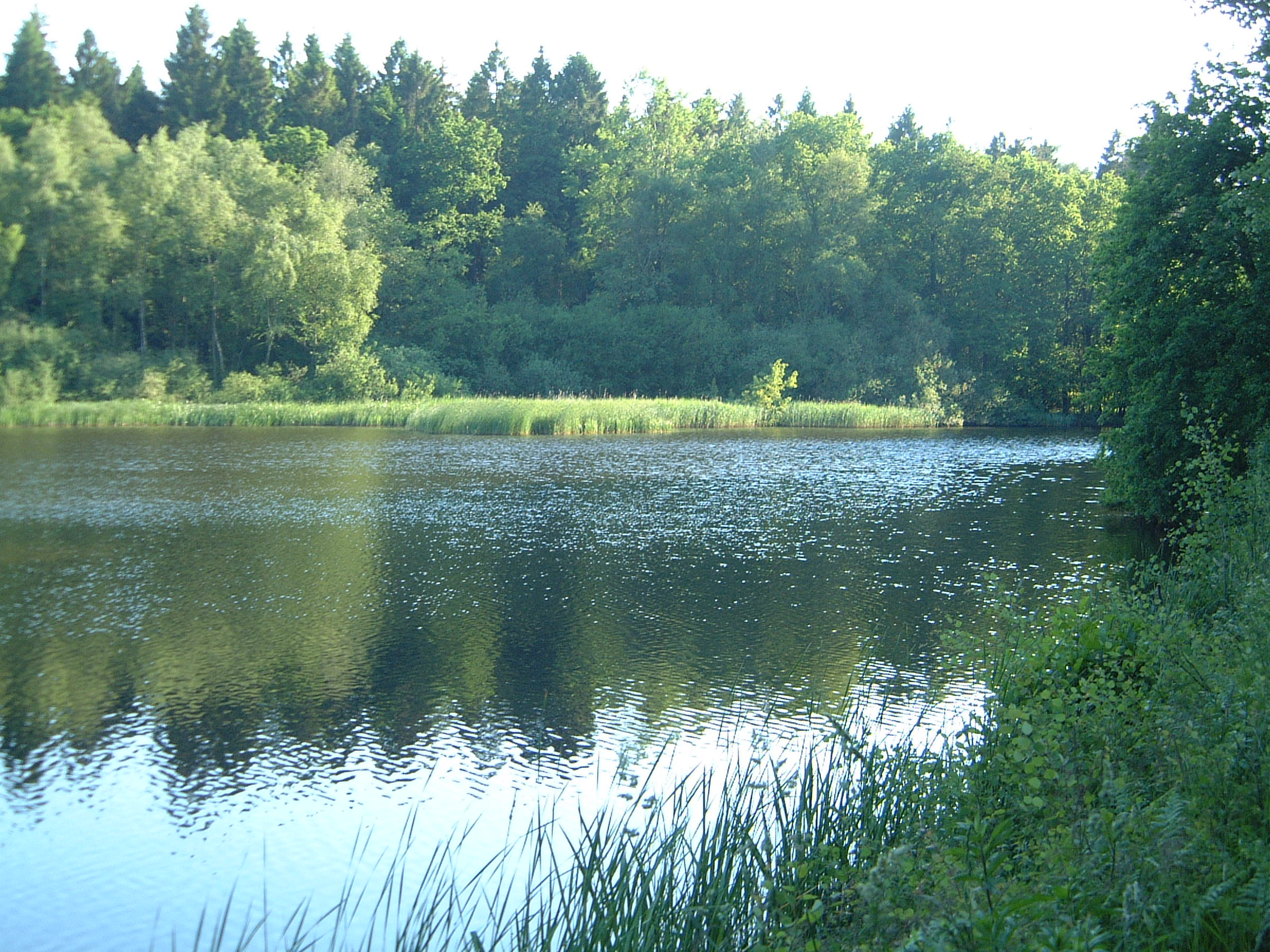 Teich in der Nähe von Waldhütten